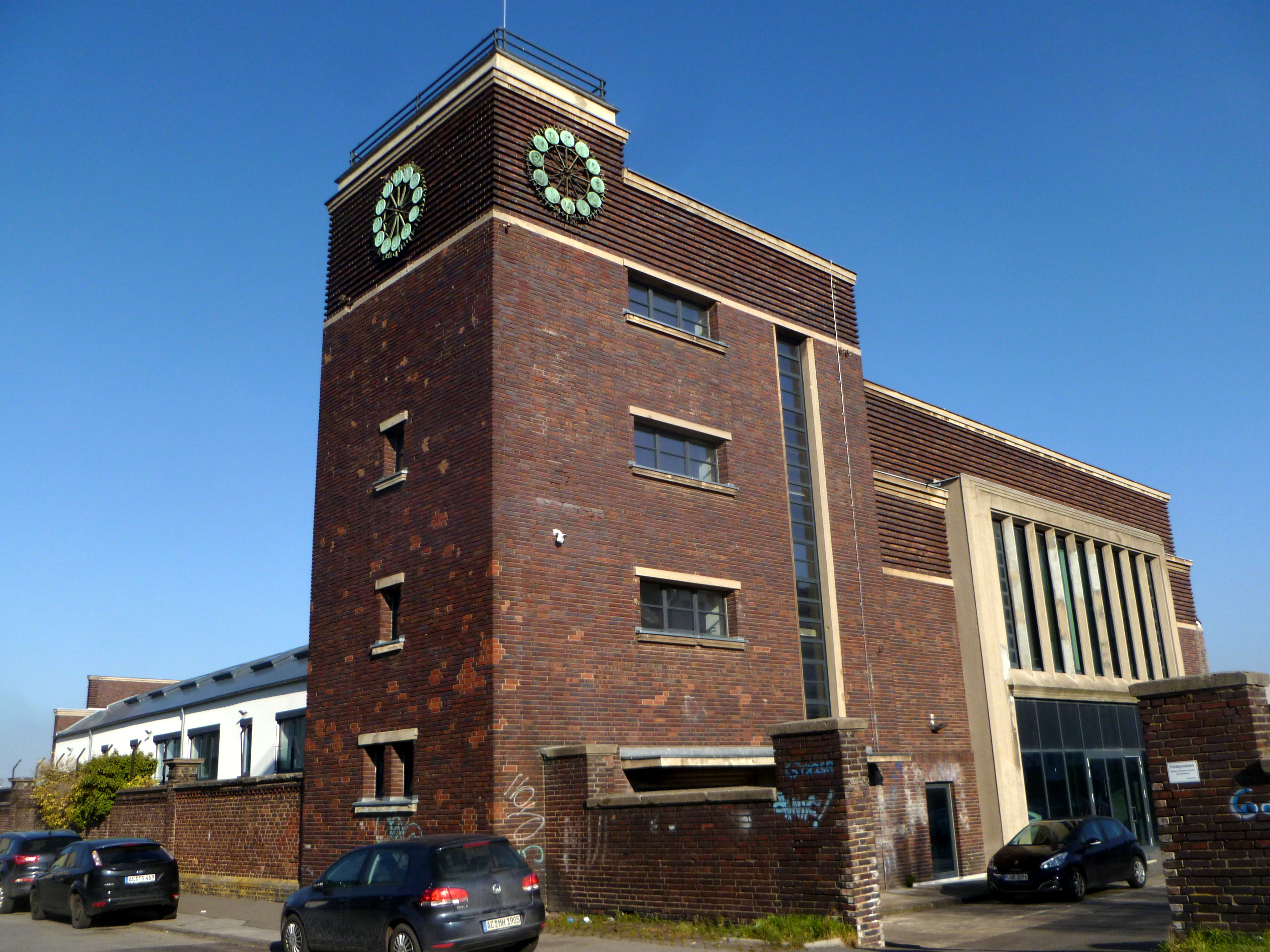 Alter Schlachthof Aachen, ehemalige Fleischabholhalle mit Uhrenturm